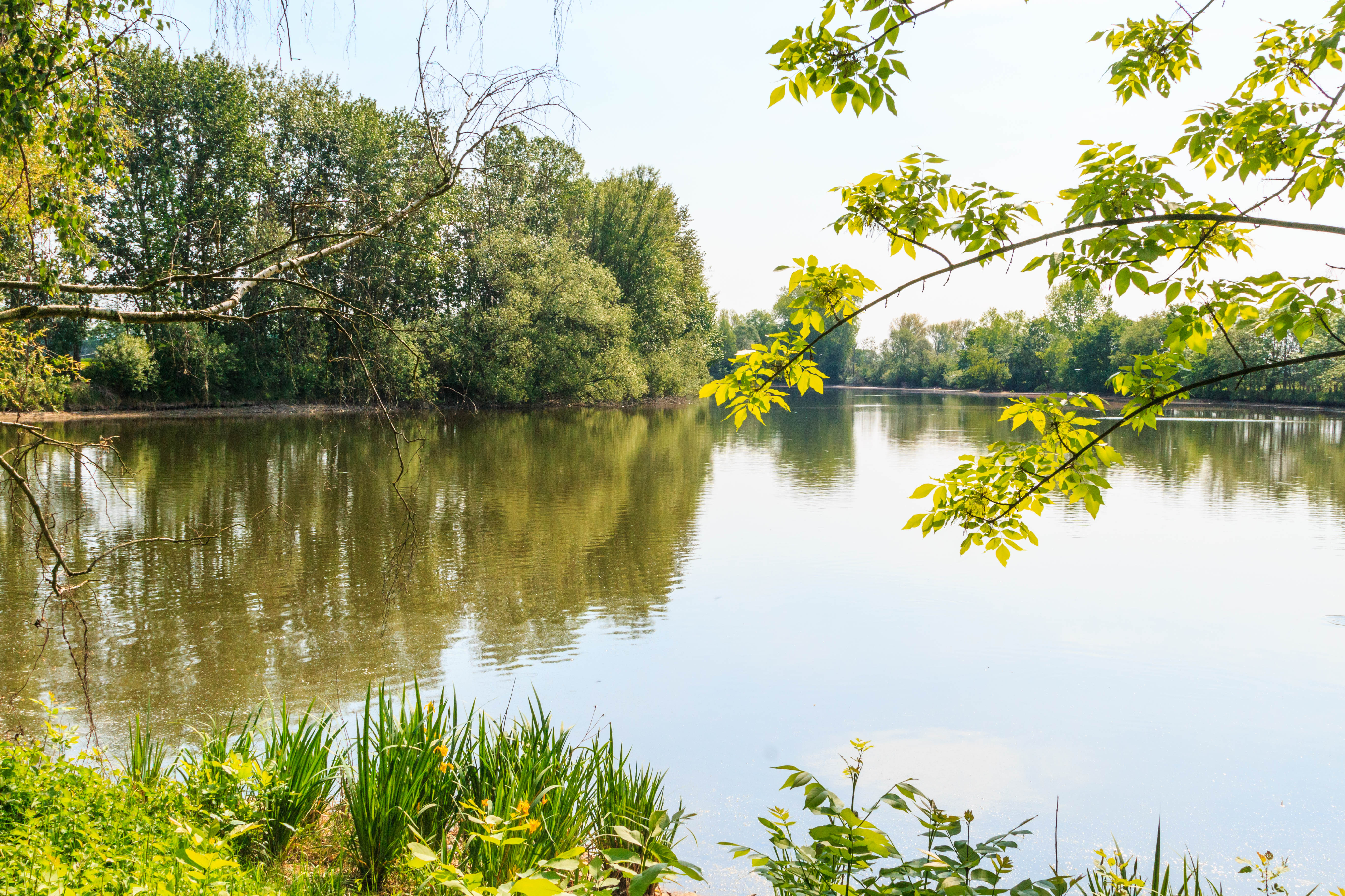 Rybník Ohrádka u Hostovic Project: Vodstvo.